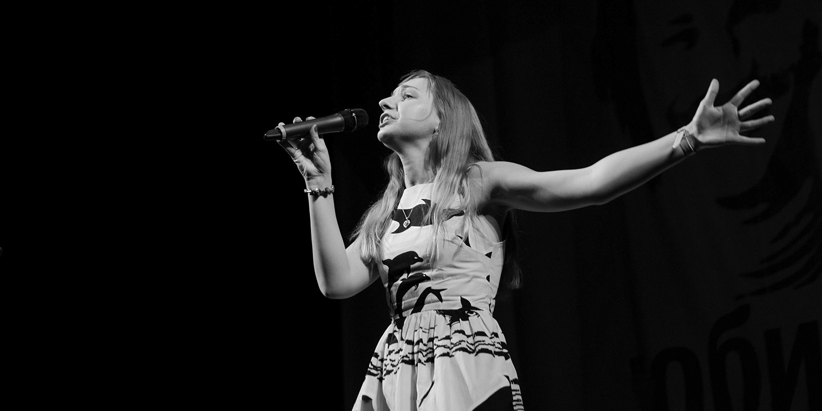 Алёна Синица, участница Московского театра поэтов